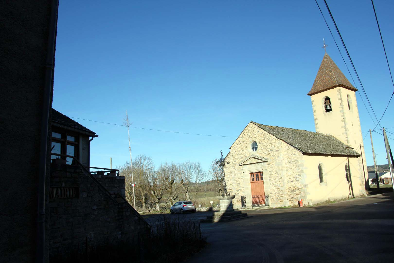 Marie et église de Servières (Lozère - France)